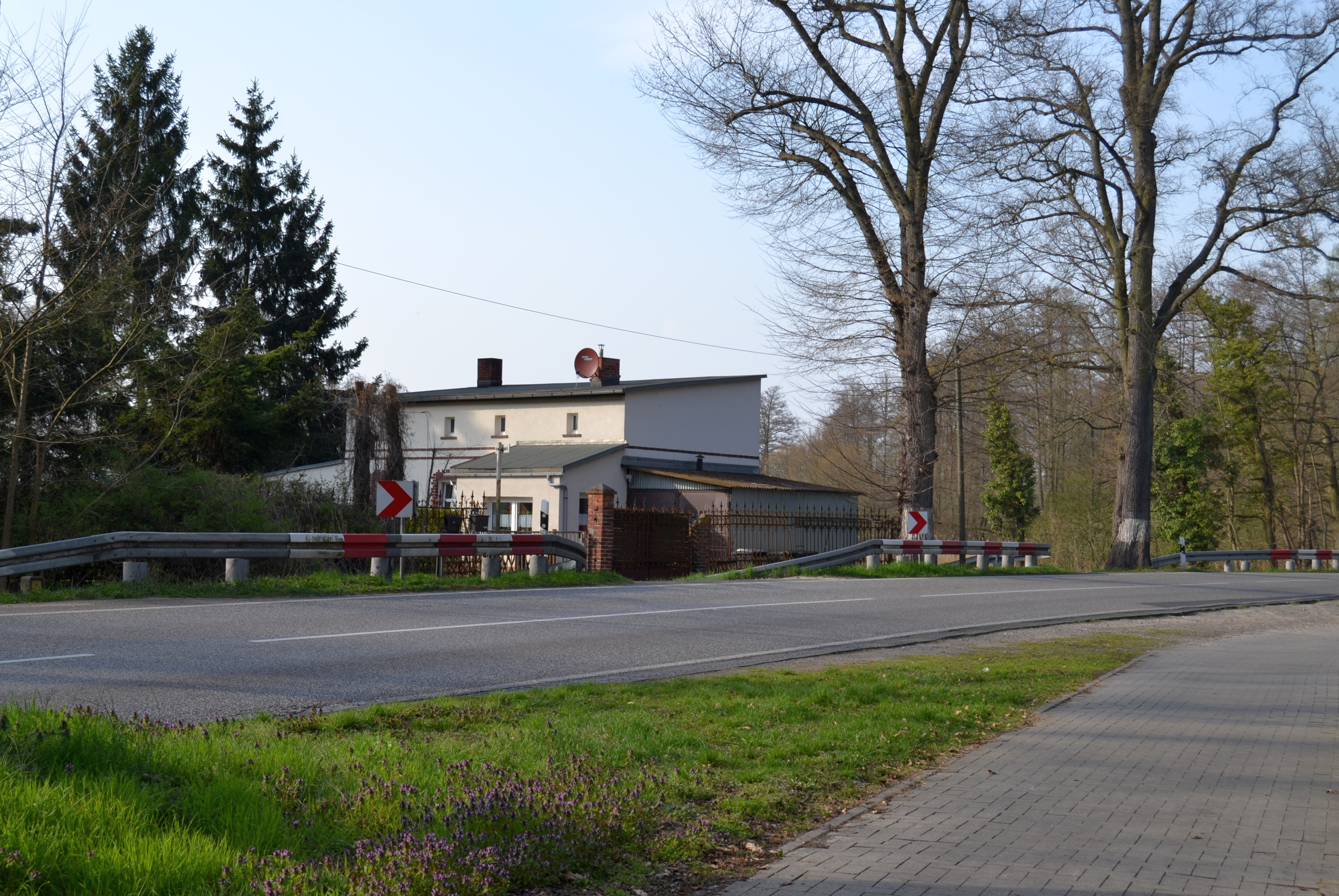 Wohnplatz Schönschornstein/ Erkner.